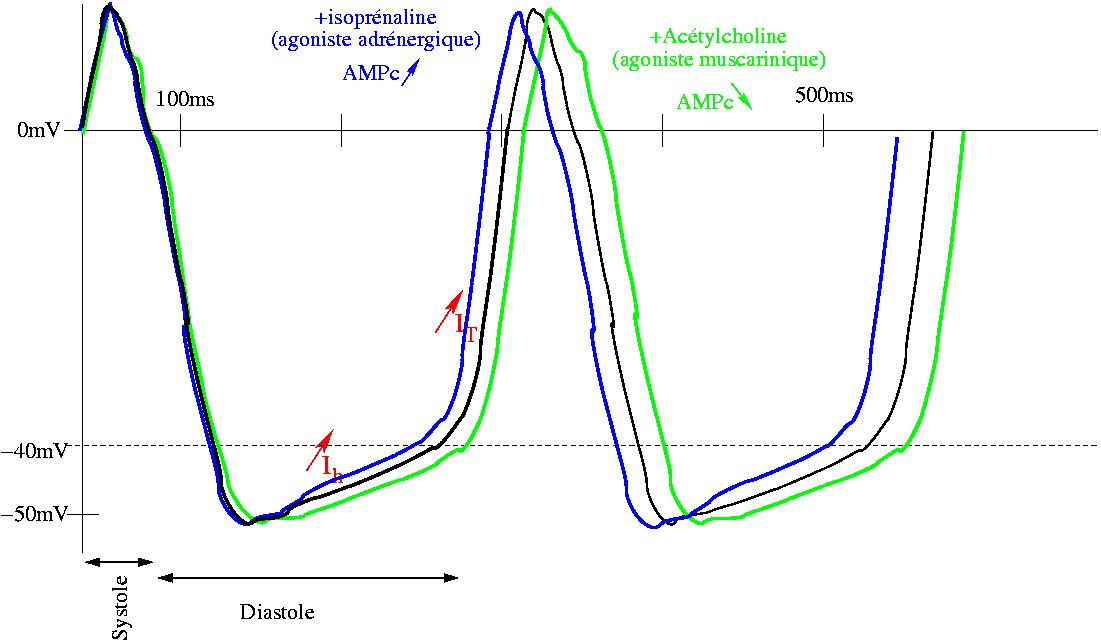 Schéma électrophysiologique de la génération autonome du rythme cardiaque au niveau des cellules du nœud sinusal, et régulation du rythme par l'AMPc Pour qui veut retravailler sur le fichier en format Xfig, me demander--Philippe Gastrein 13 septembre 2005 à 19:15 (CEST)